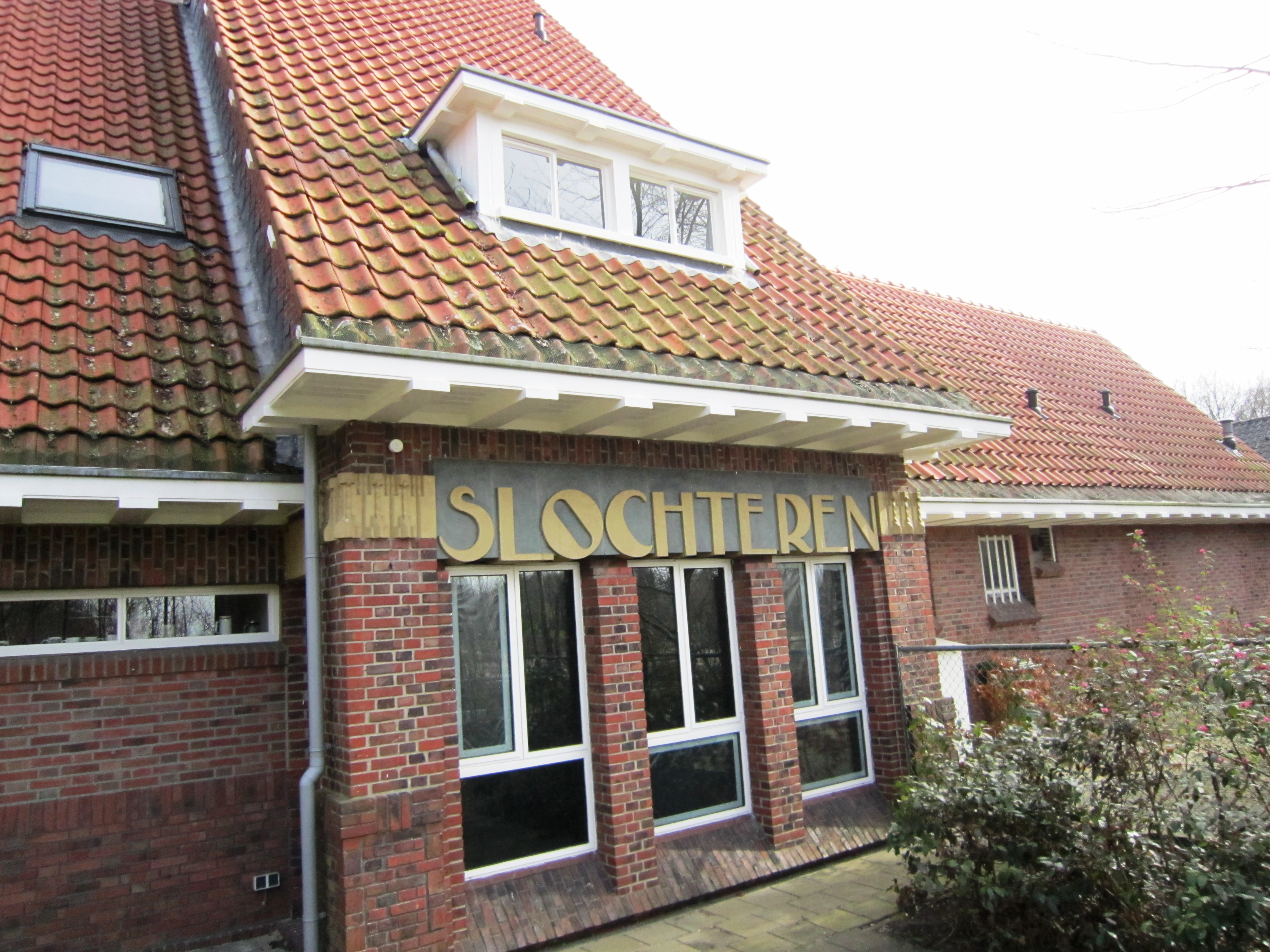 Slochteren IPA 2